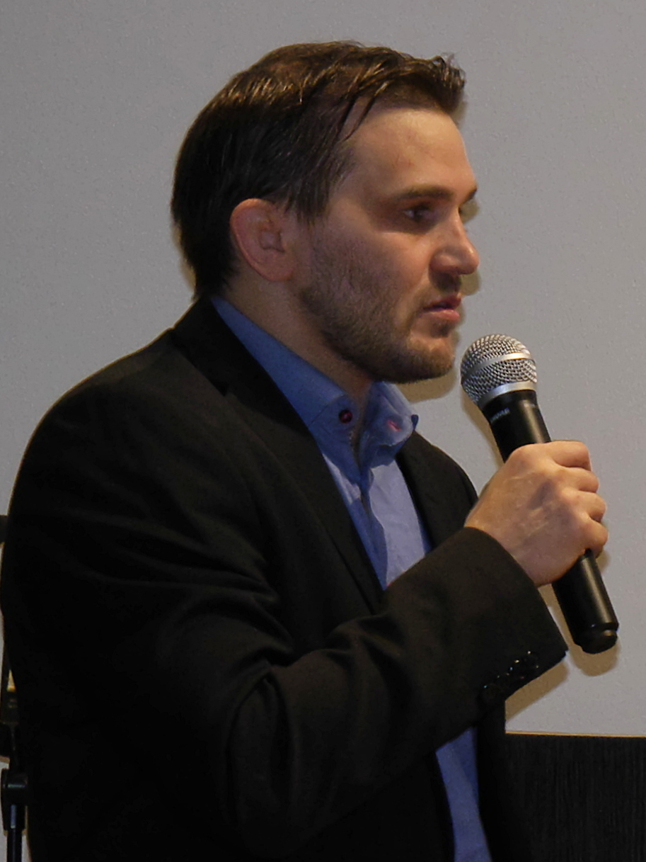 Jarkko Ala-Huikku marraskuussa 2018 Lappajärvellä maailmanmestaruusjuhlissa.